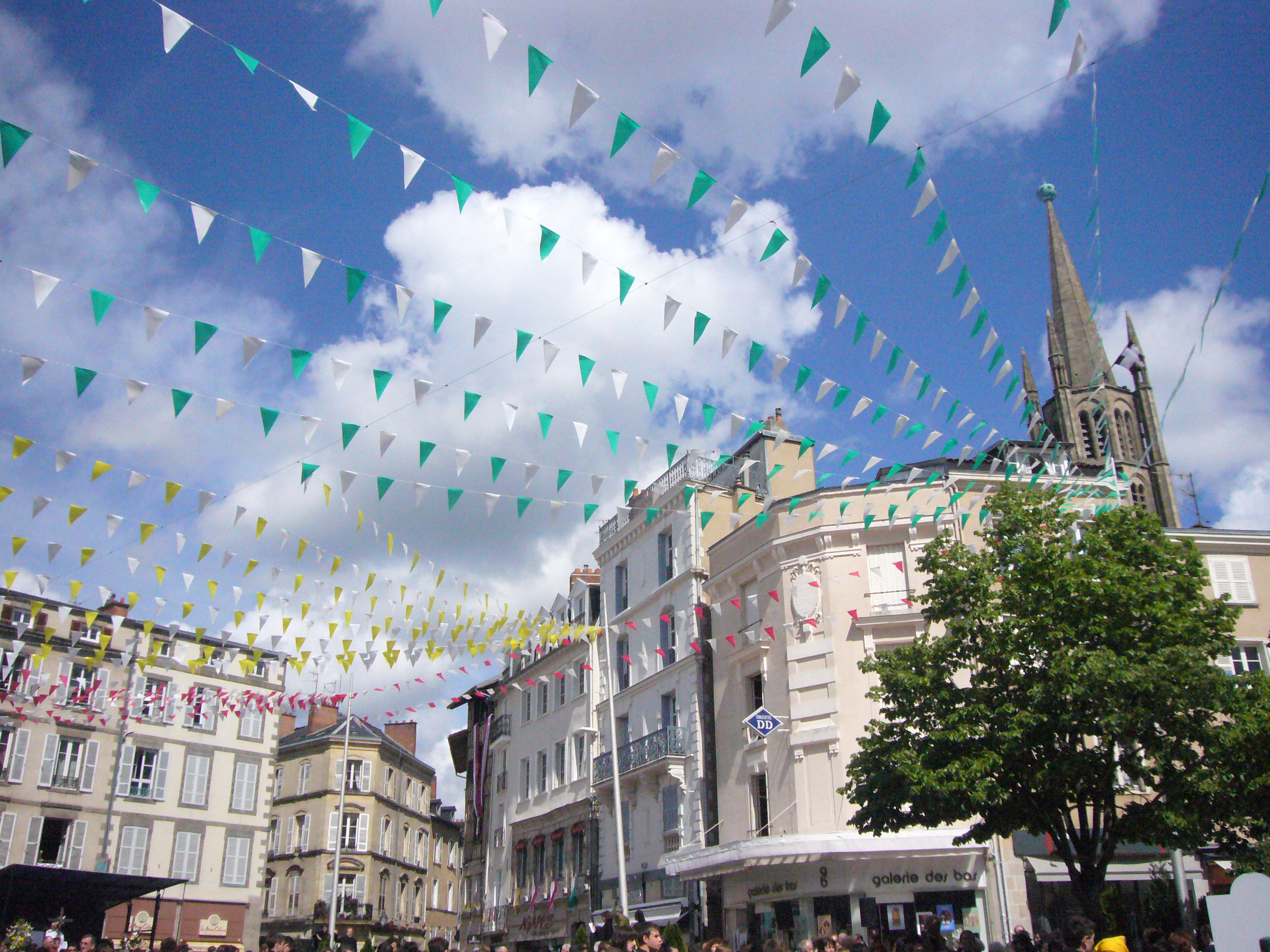 La place de la Motte décorée lors des Ostensions 2009 (Limoges, Haute-Vienne, France)